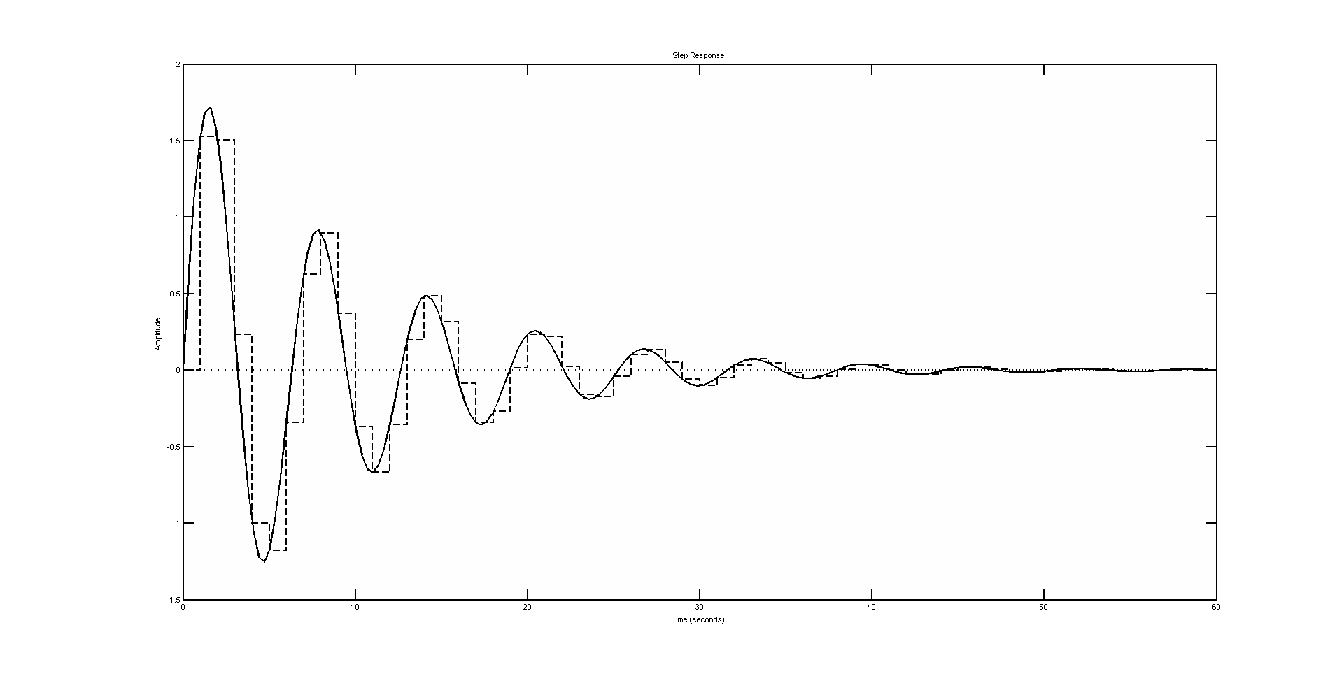 Deitsch: Vergleich der Sprungantworten einer zeitkontinuierlichen- und zeitdiskreten Übertragungsfunktion. Die Diskretisierung geschah mithilfe eines mathematischen ZOH-Glied-Modells. Die gestrichelte Linie ist die Sprungantwort des zeitdiskreten Systems, die durchgehende Linie die des zeitkontinuierlichen Systems